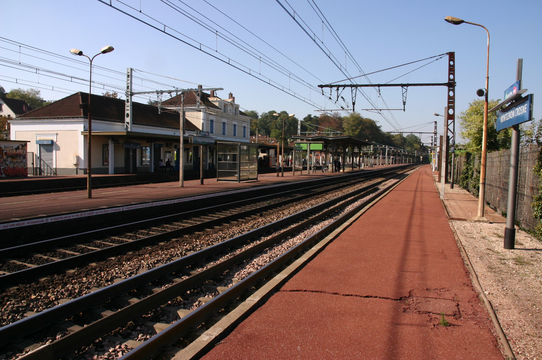 La Gare de Montgeron-Crone, Montgeron, département de l'Essonne, France